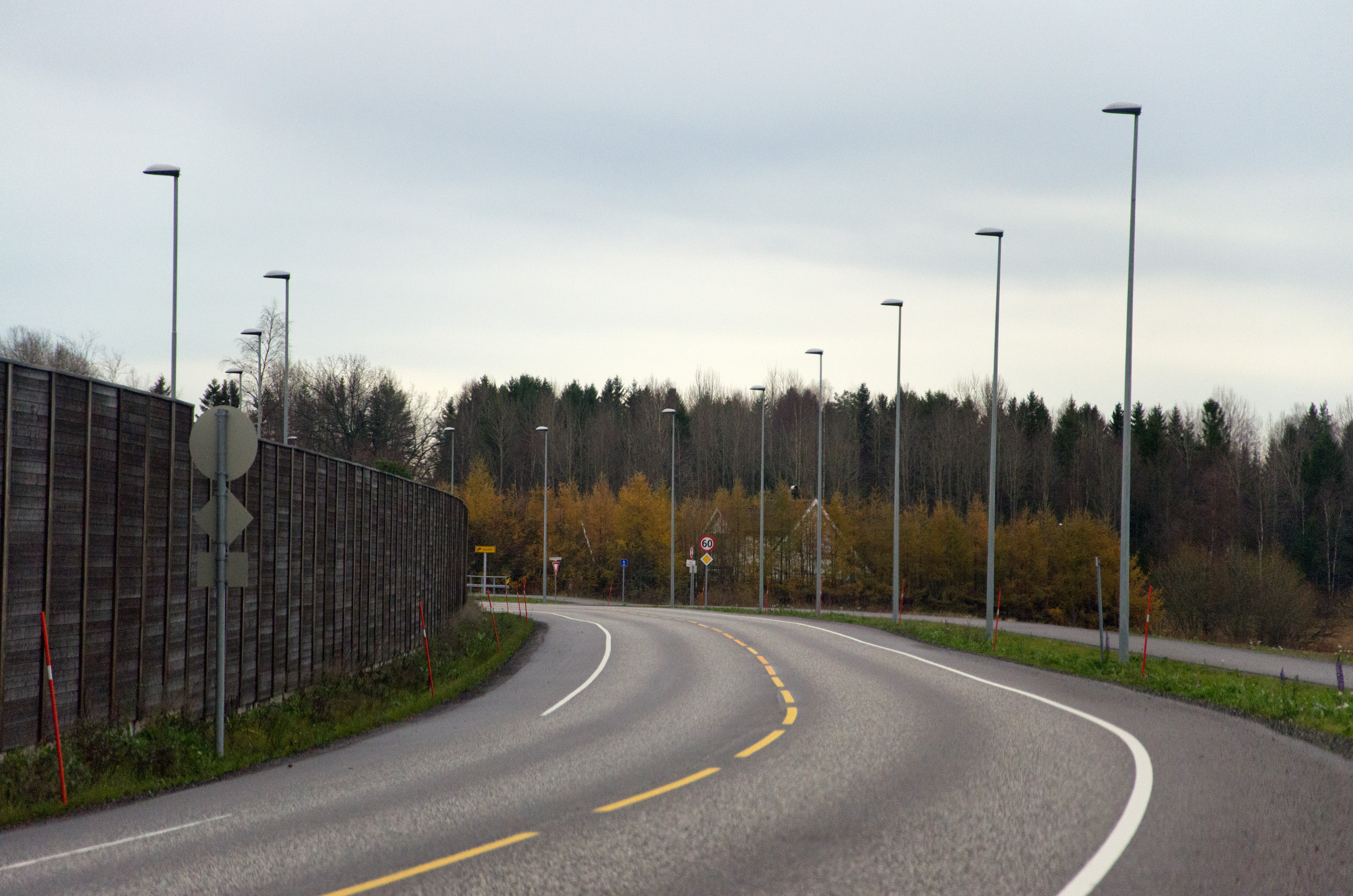 Vestfolds fylkesvei 522 Stokke Ravei